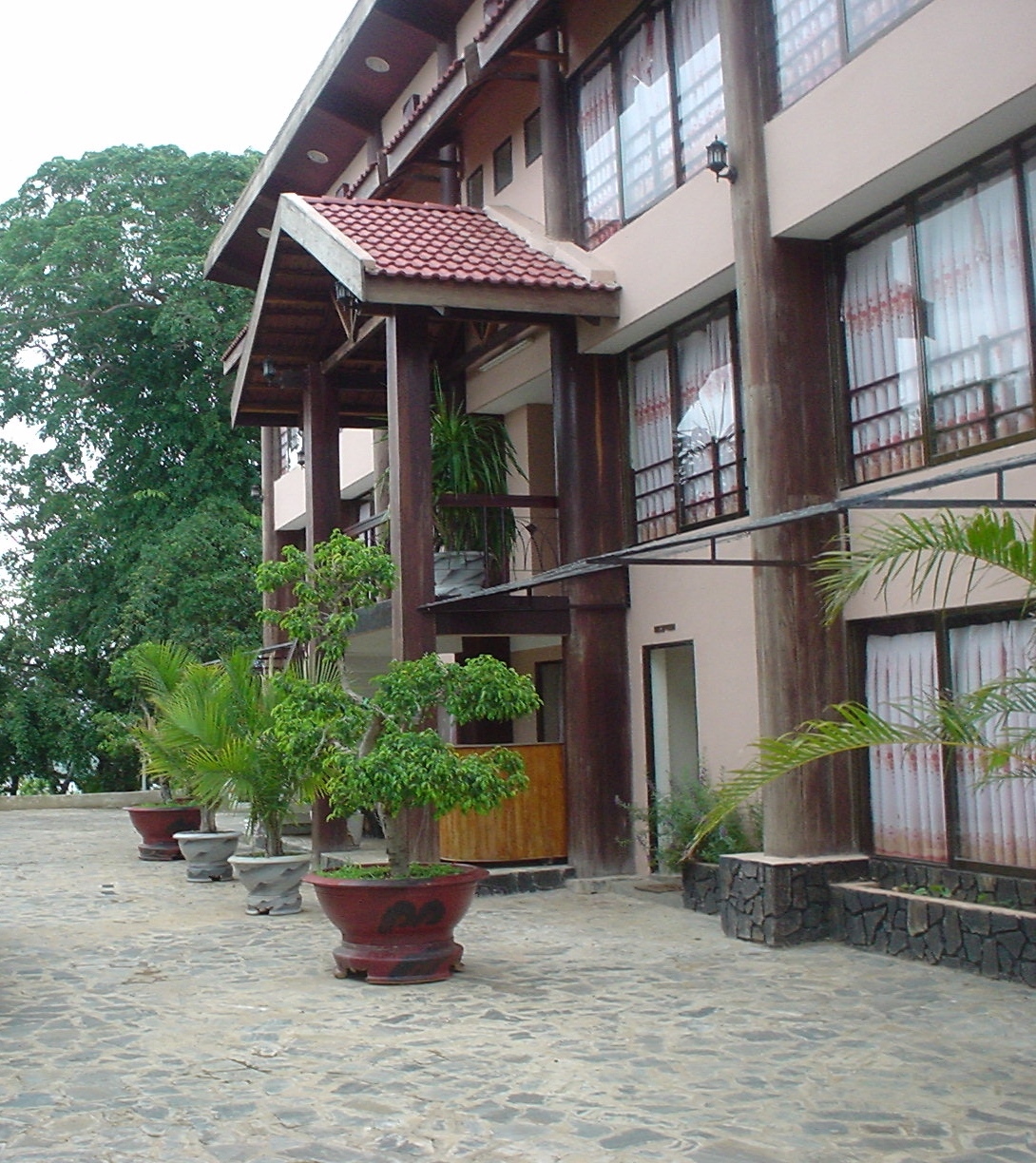 Biệt điện của hoàng đế Bảo Đại cạnh hồ Lắk (Đăk Lăk), nay là một viện bảo tàng. Biệt điện của hoàng đế Bảo Đại cạnh hồ Lắk (Đăk Lăk), nay là một viện bảo tàng.